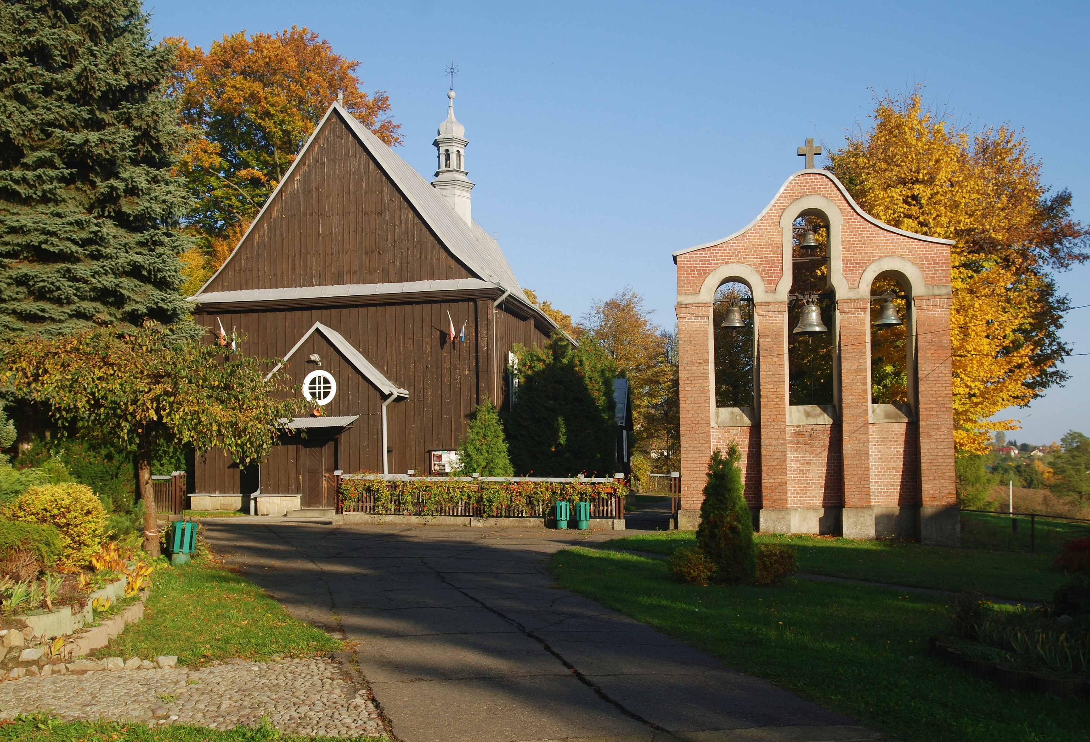 kościół